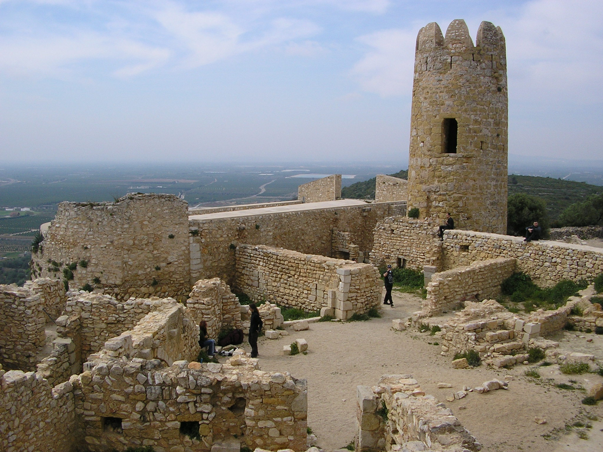 El Castell d'Ulldecona. Source: Makinal